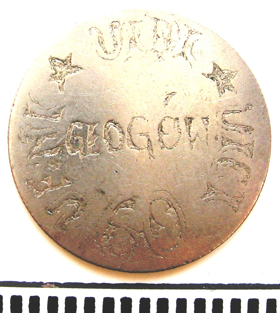 Rewers medalu "Tygrysa" - żołnierza, który odbył co najmniej 60 dni kary służby w 9 Oddziale Dyscyplinarnym w Wędrzynie. W otoku monety wygrawerowana został maksyma: "Veni, Vidi, Vici" (łac. Przybyłem, zobaczyłem, zwyciężyłem), w centrum - nazwa miejscowości, z której pochodził ukarany żołnierz, a poniżej liczba "60" oznaczająca liczbę dni kary. "Medal" wykonany został z monety o nominale 20 zł.